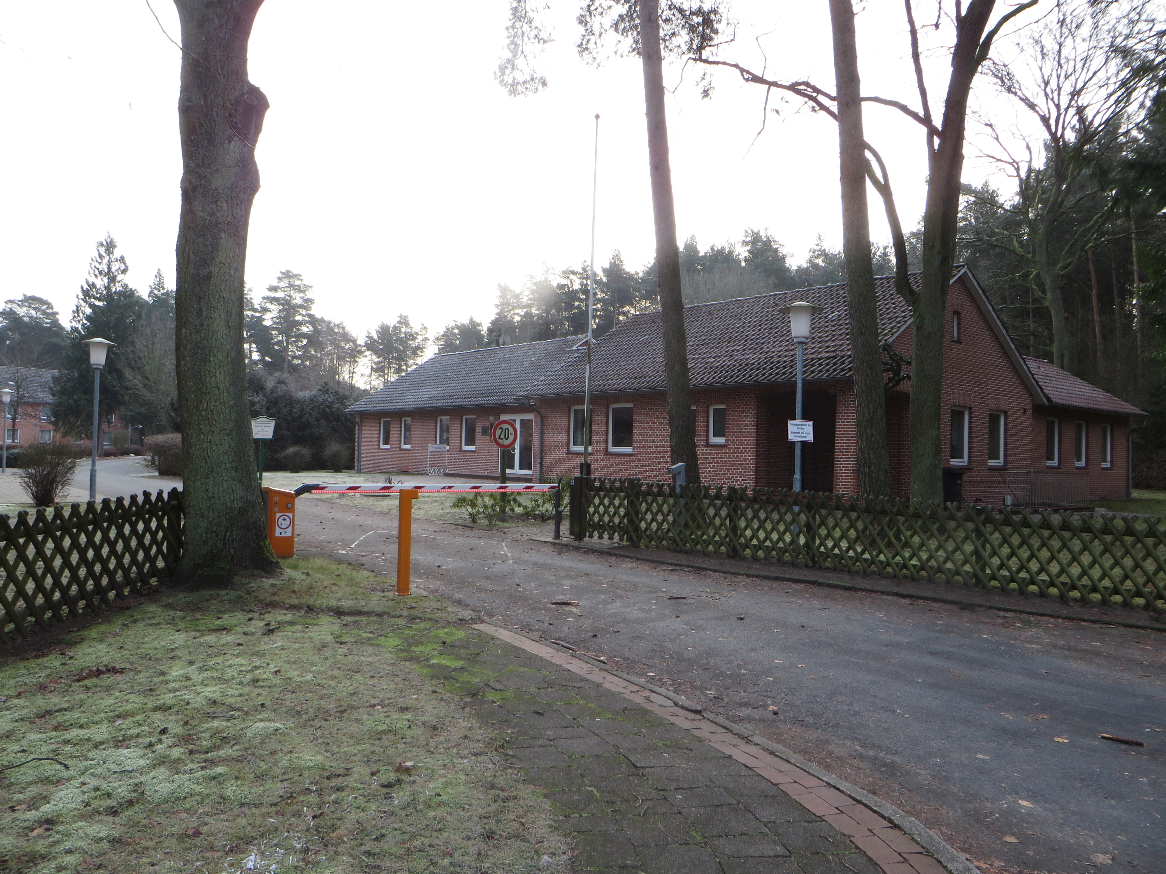 Gelände der Zollhundeschule Bleckede